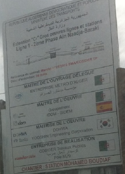 Chantier extension C1 du métro d'Alger